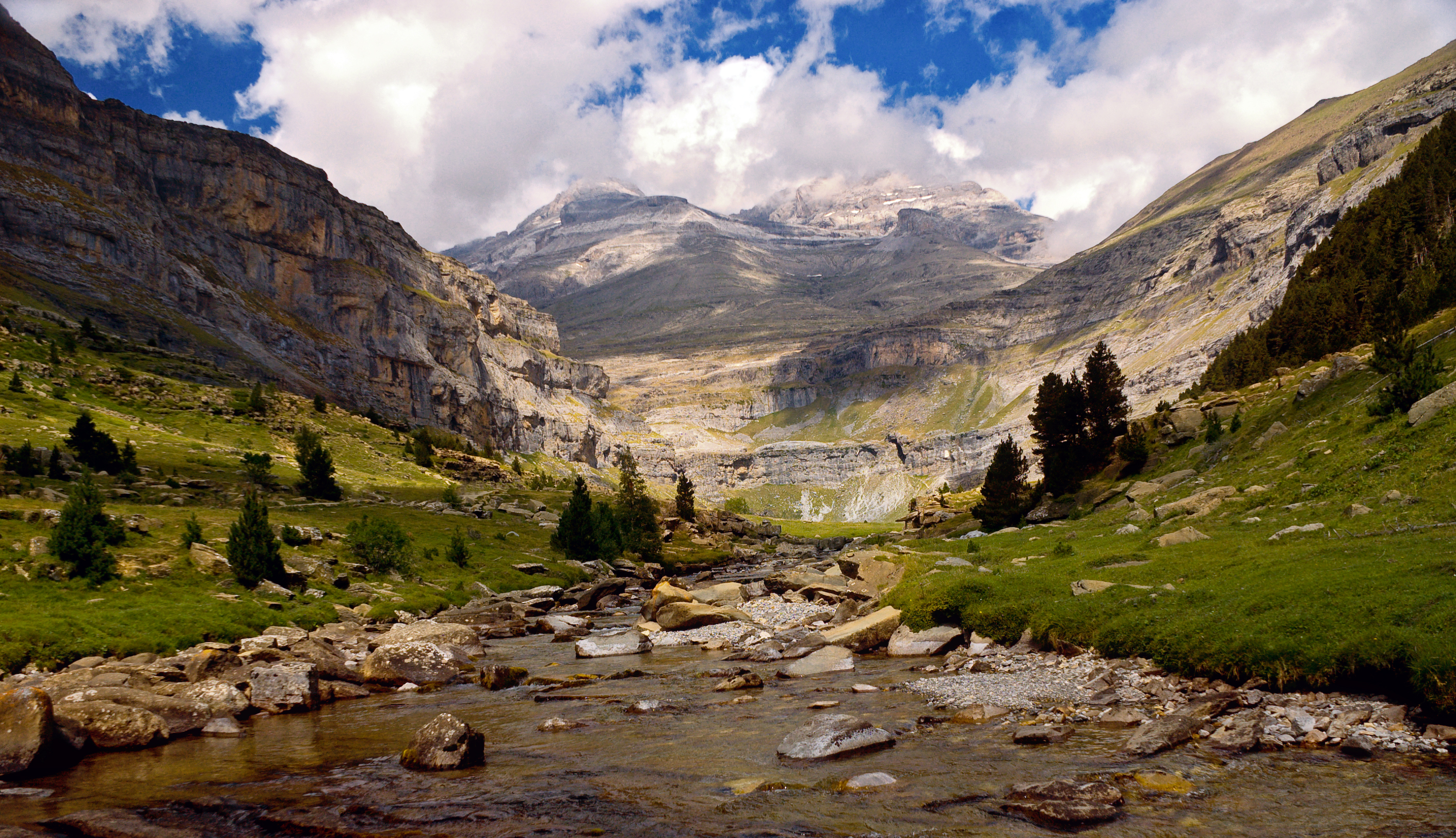 Parque Nacional de Ordesa y Monte Perdido. Ordesa y Monte Perdido National Park, Huesca, Spain.